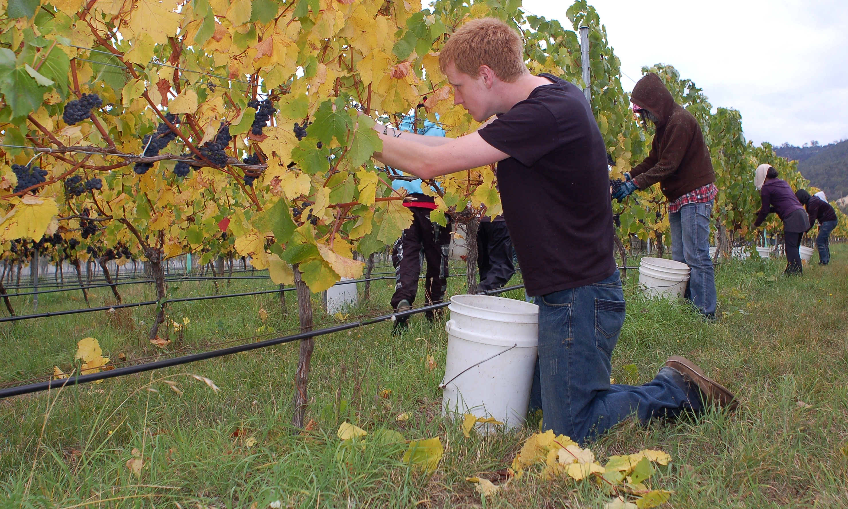 Taken at Stefano Lubiana Wines, Tasmania. Vintage 2010.